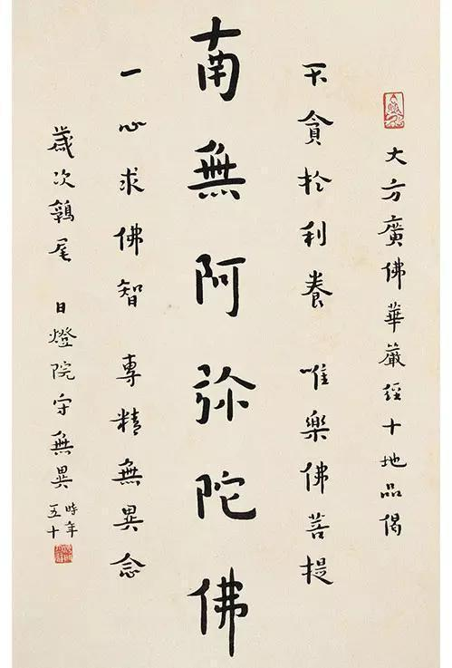 中文（香港）: 李叔同晚期書法